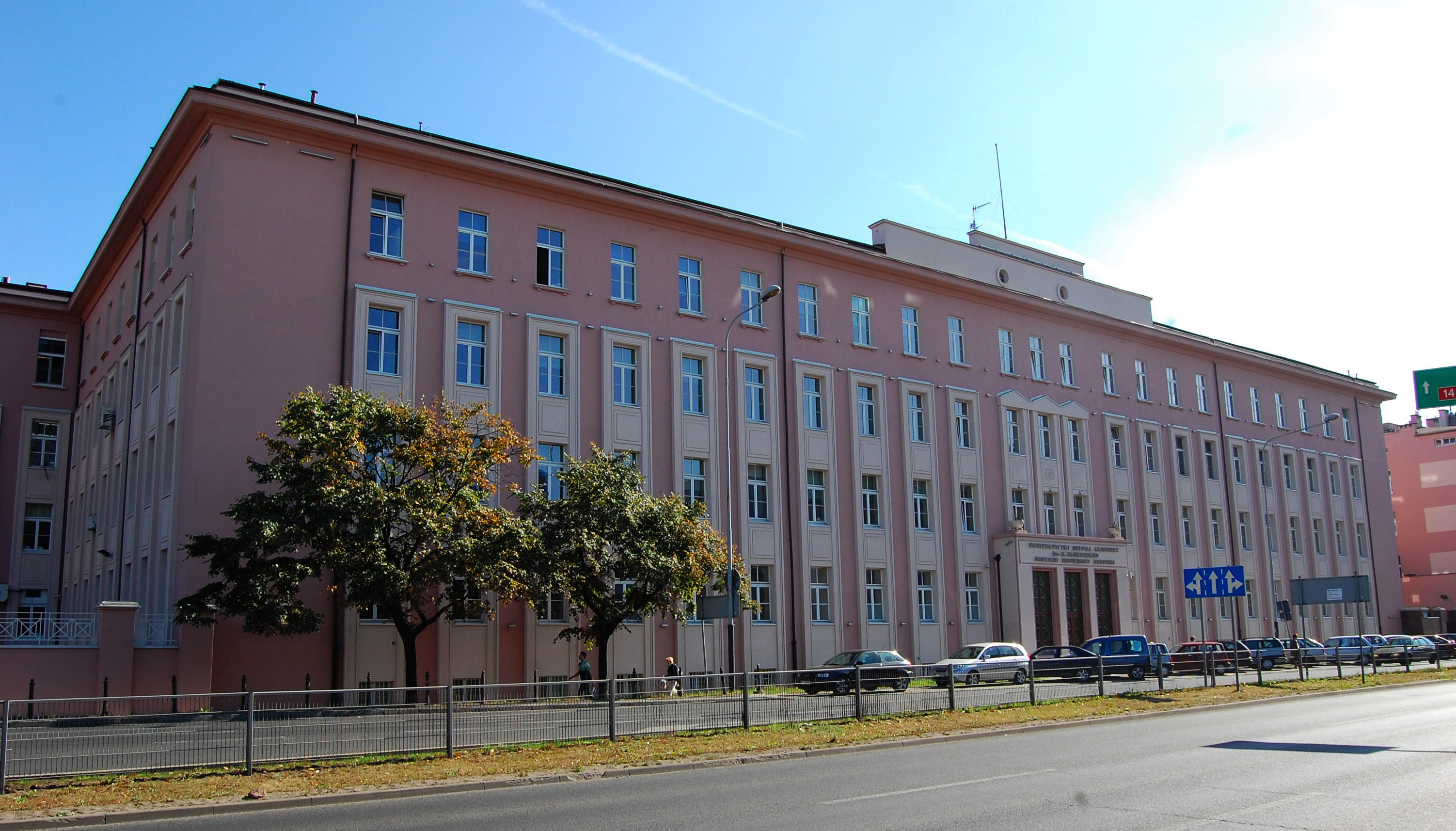 Łódź, ul. Kopcińskiego 22